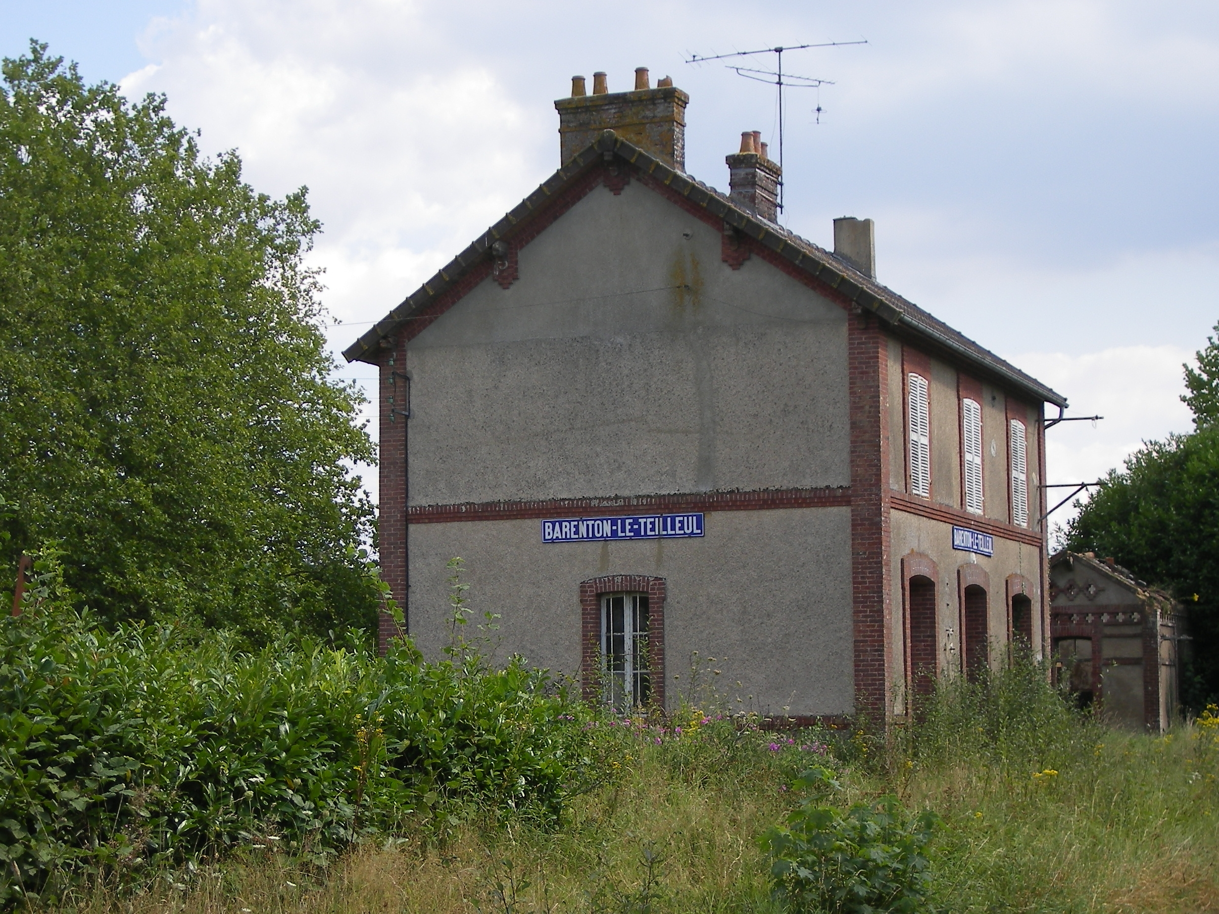 La gare de Barenton - Le Teilleul, située sur la commune de Saint-Cyr-du-Bailleul, en août 2007; réhabilité en gîte d'étape depuis avril 2012